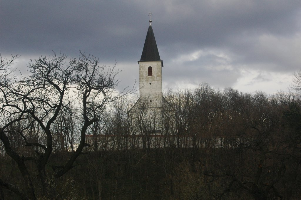 Plavecký Mikuláš, catholic church (18 st.)